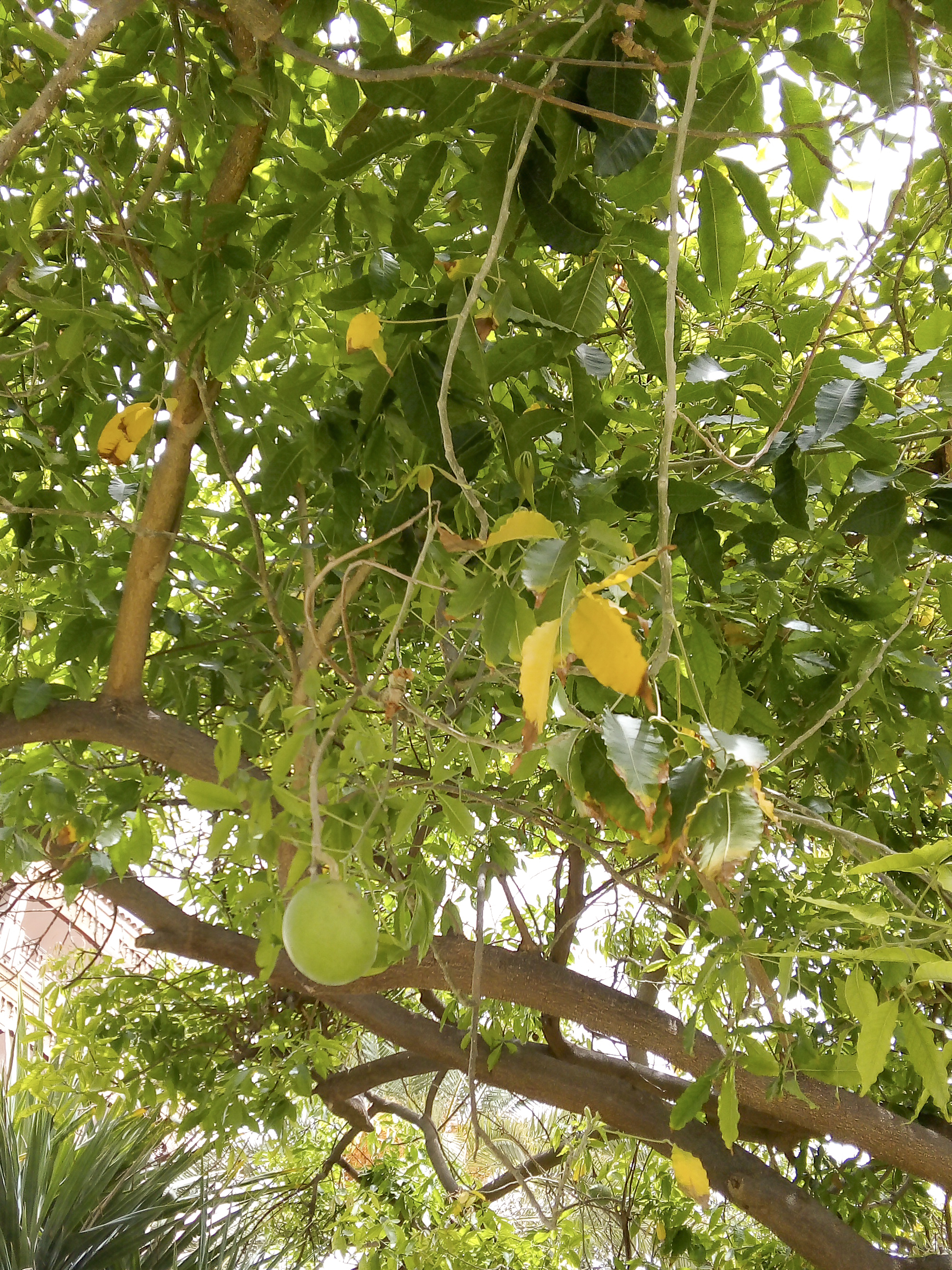 Árbol del zapote en Gran Canaria, España